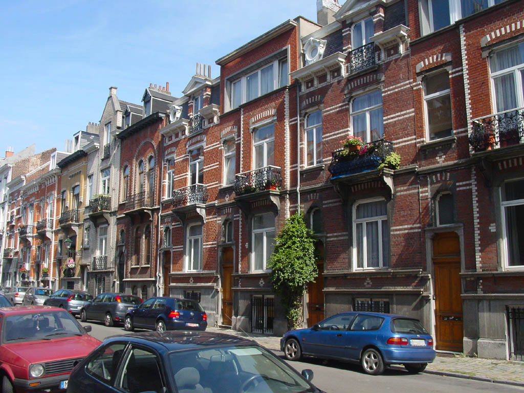 Rue des Boers in Etterbeek, taken by David Edgar on 2005-08-28.